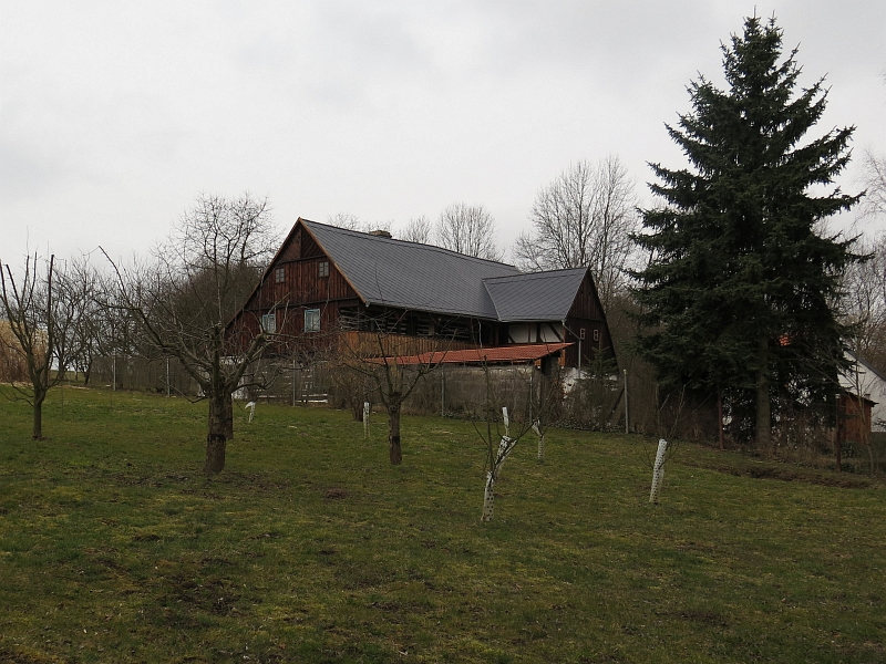 Usedlost čp. 7, Kalovice 7, Kalovice.